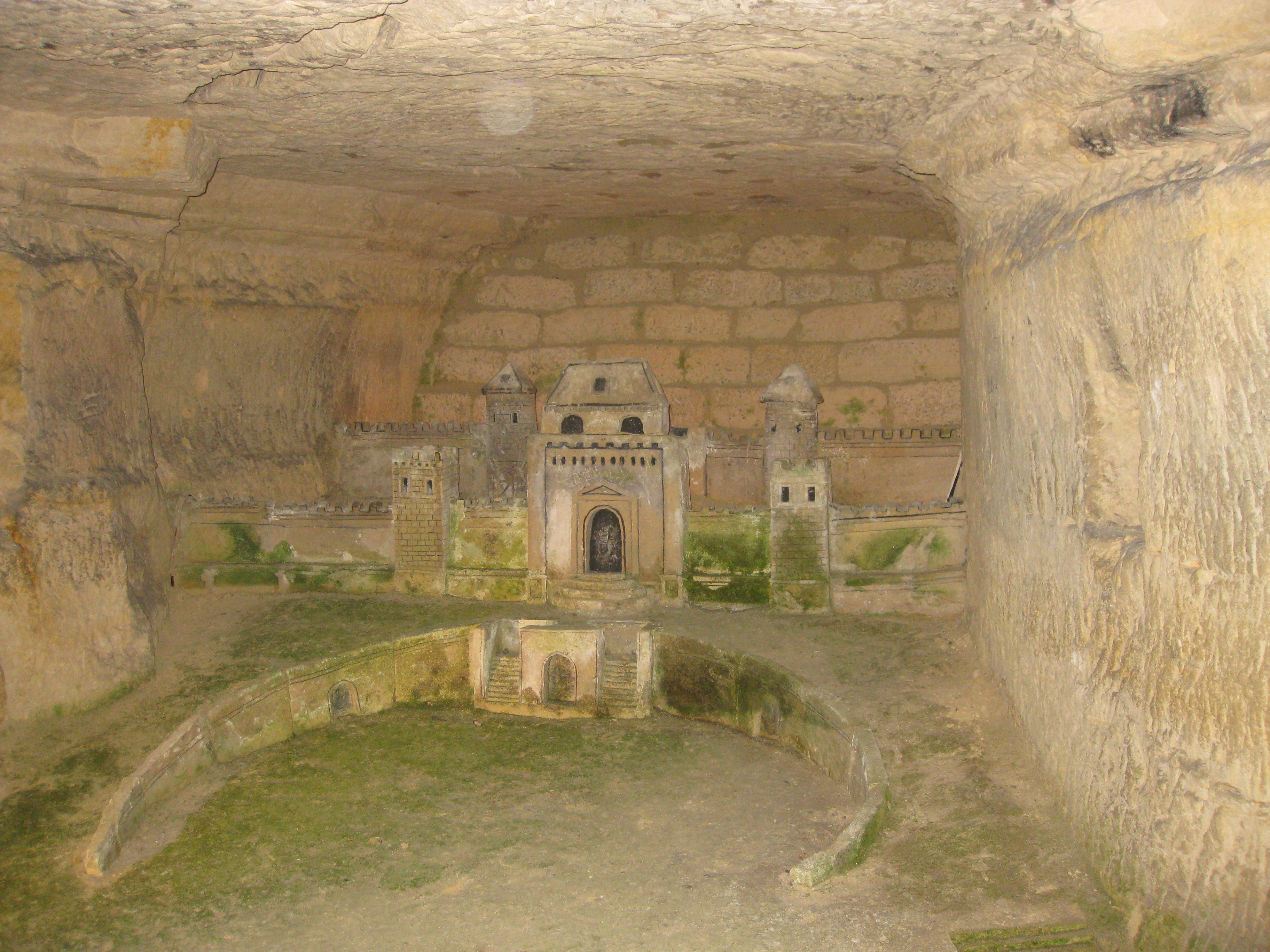 Catecombes de Paris הקטקומבות של פריז